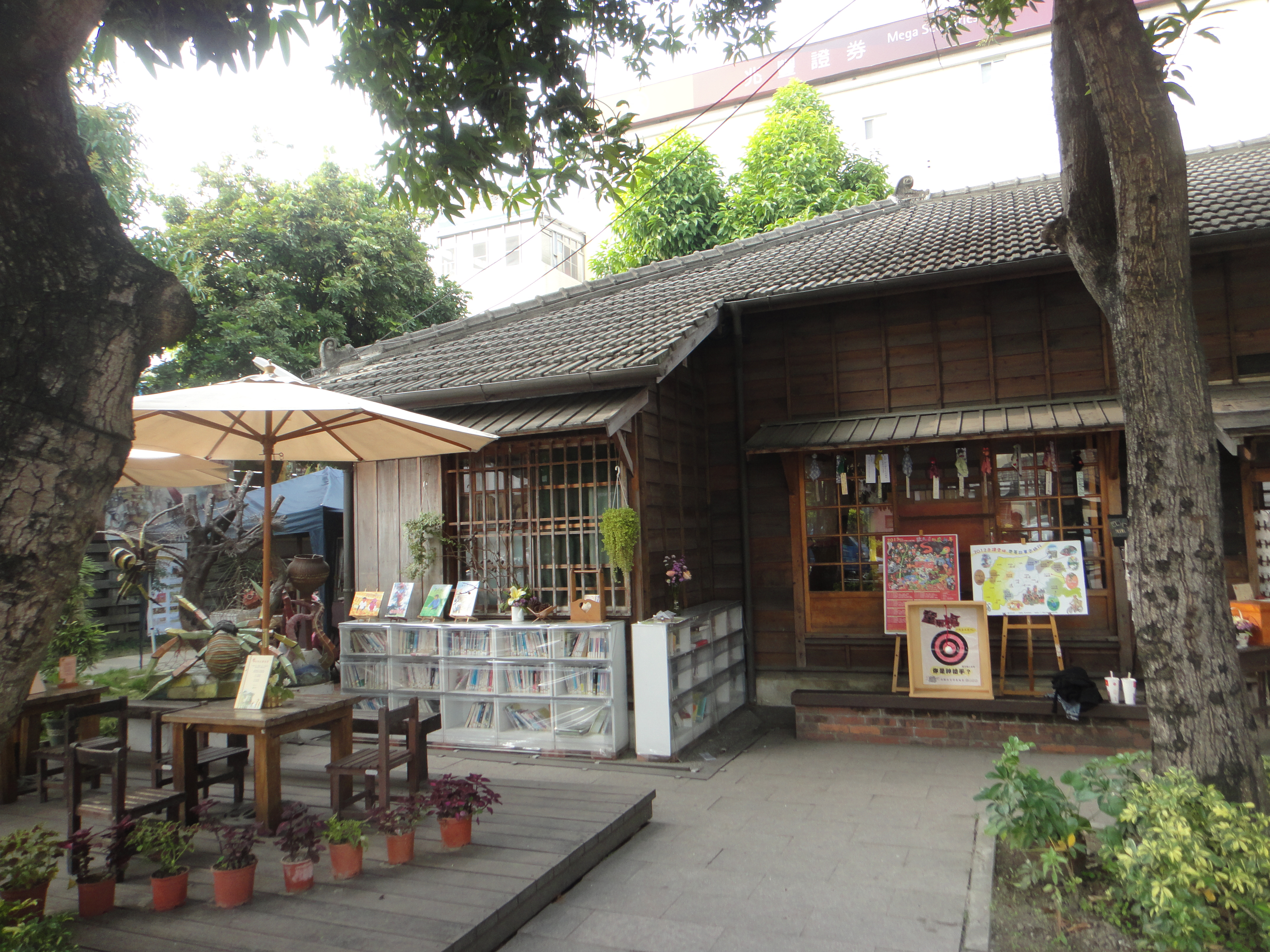 虎尾郡手官邸(左側)